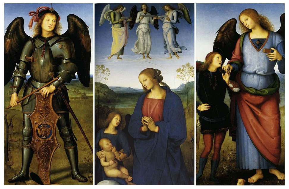 Reconstitution du polyptyque de la Chartreuse de Pavie du Pérugin